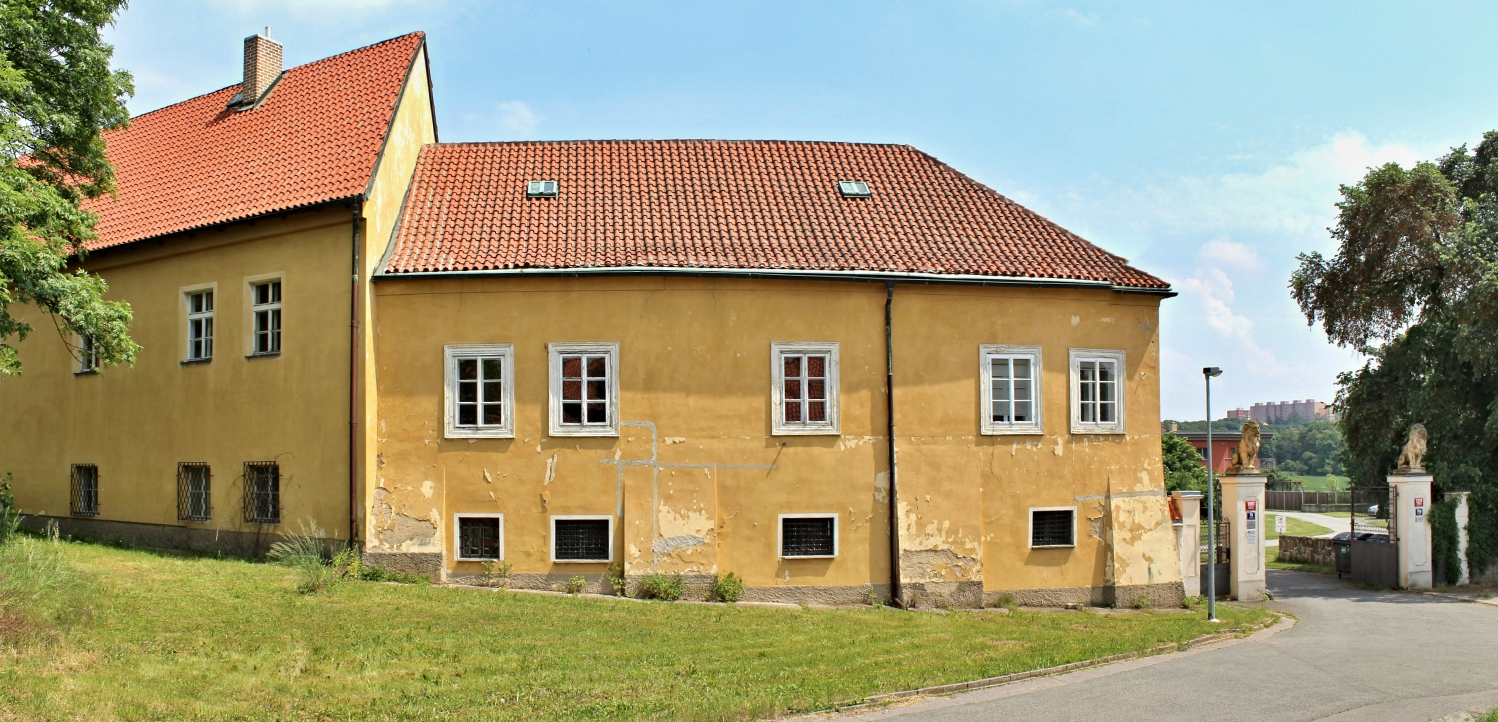 Práčský zámeček, Praha 10-Záběhlice